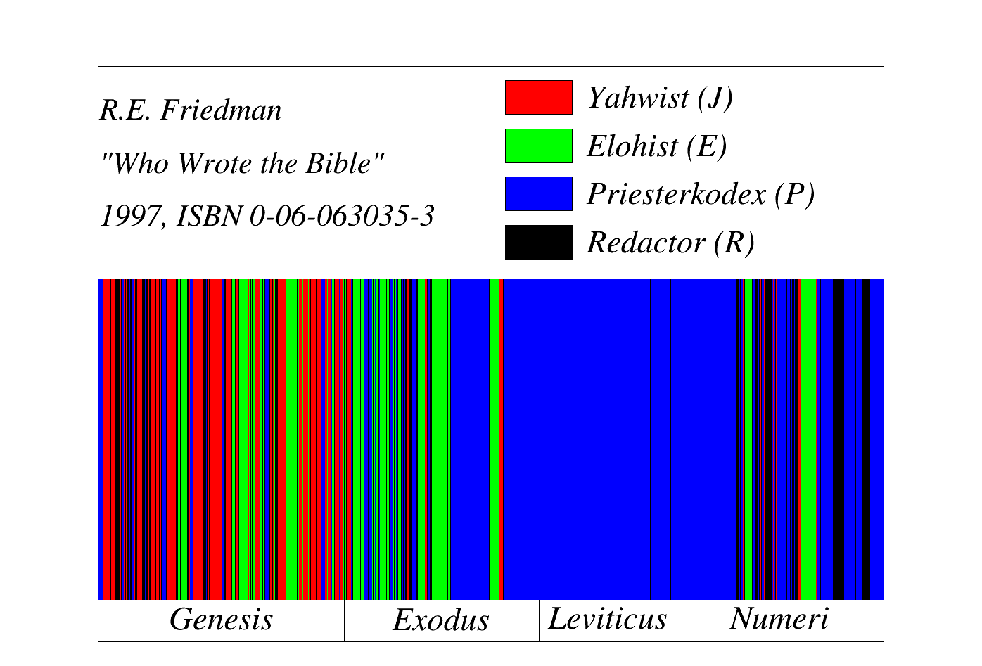 Распределение документов Йахвист, Элогист и Жреческий Кодекс, а также материала, добавленного при объединении источников (Redactor) в первых четырех книгах Пятикнижия.